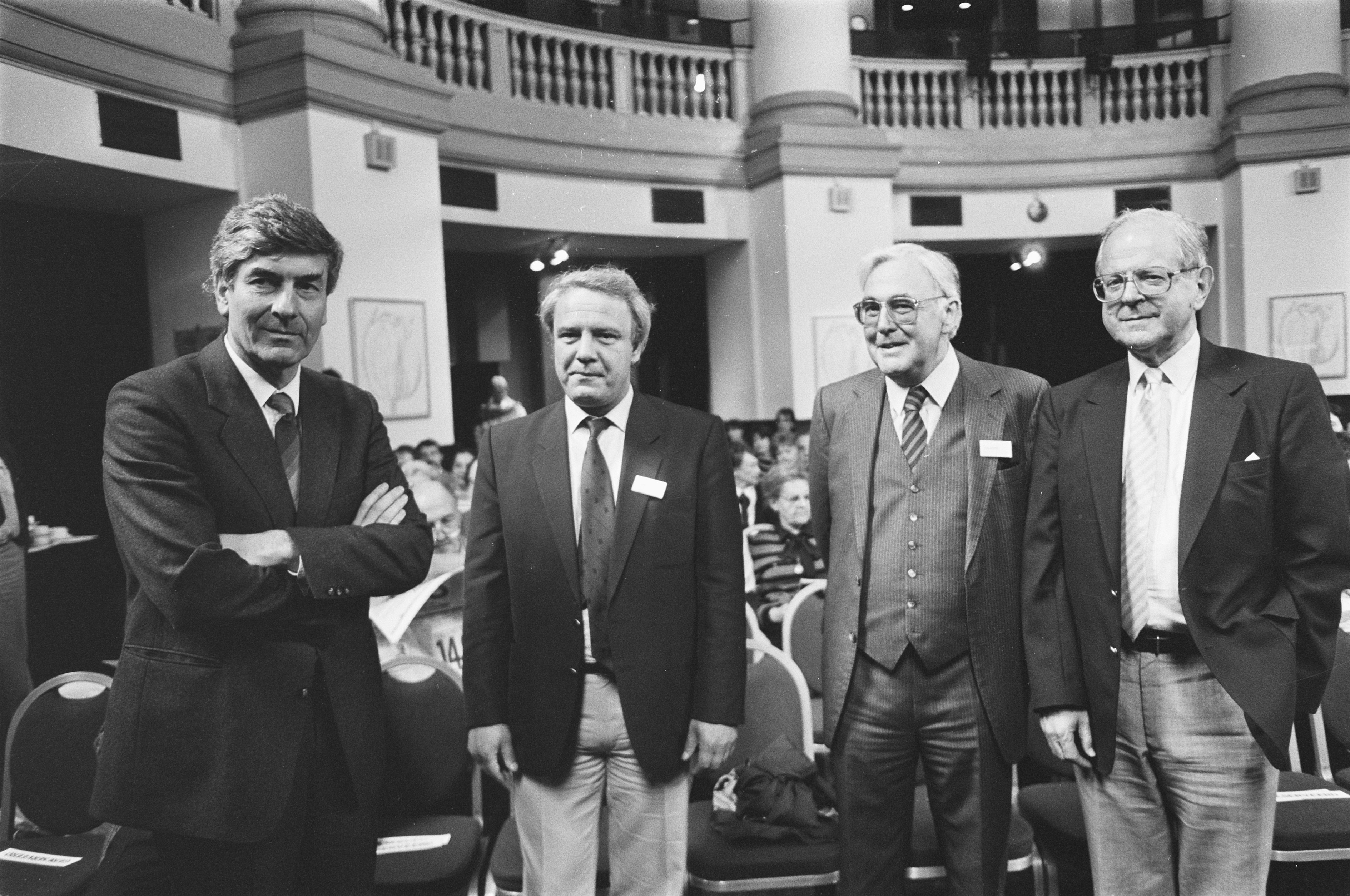 Vijfde Sacharov-congres in Amsterdam; v.l.n.r. premier Lubbers , Vladimir Boekovski , prof. J.W. Bezemer en prof. Robert Conquest voor het congres 21 mei 1987